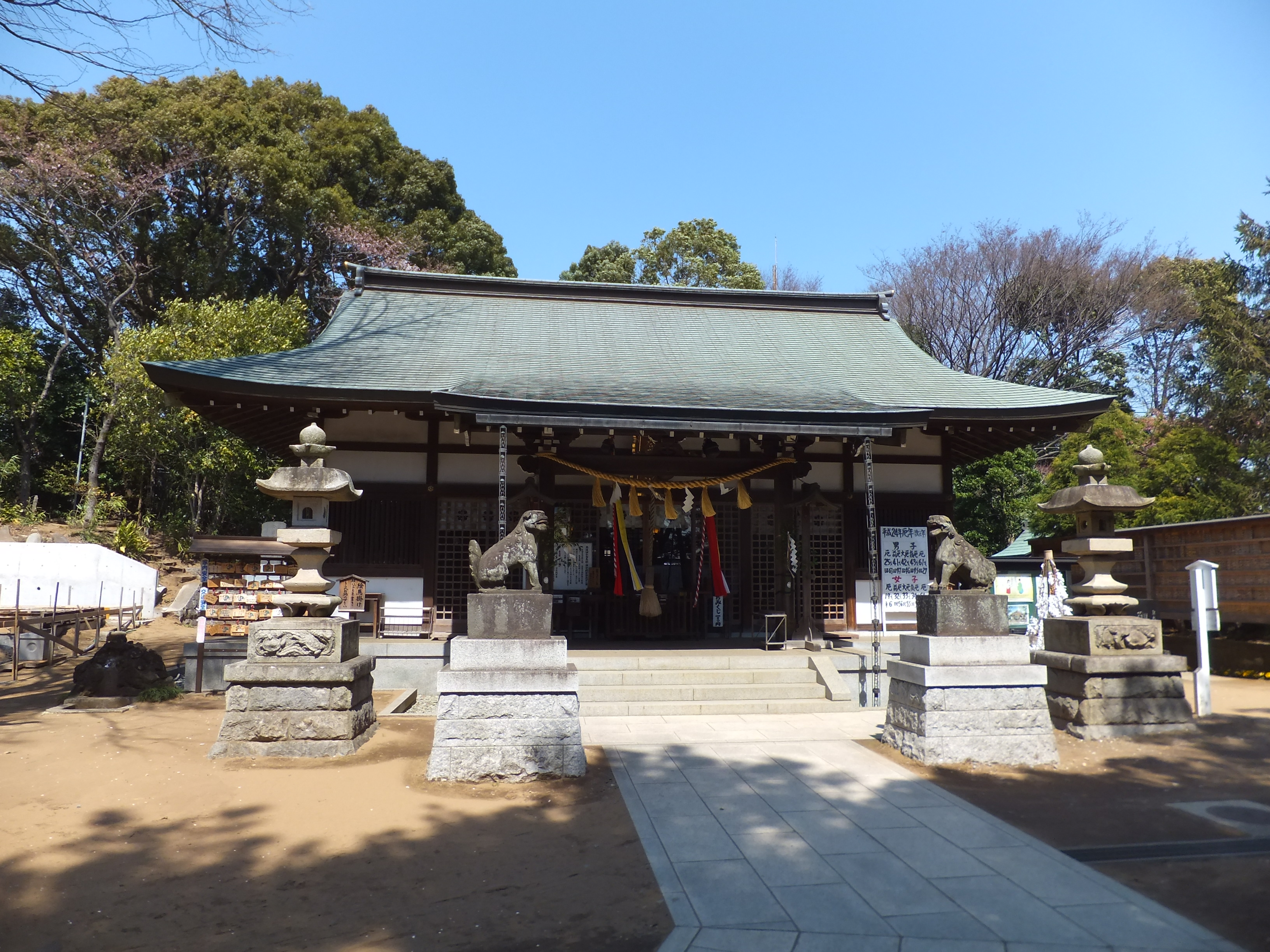 登渡神社拝殿